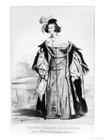 Marie Dorval in Marion Delorme, incisione